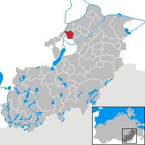 Trollenhagen in Mecklenburg-Vorpommern, Landkreis Mecklenburg-Strelitz